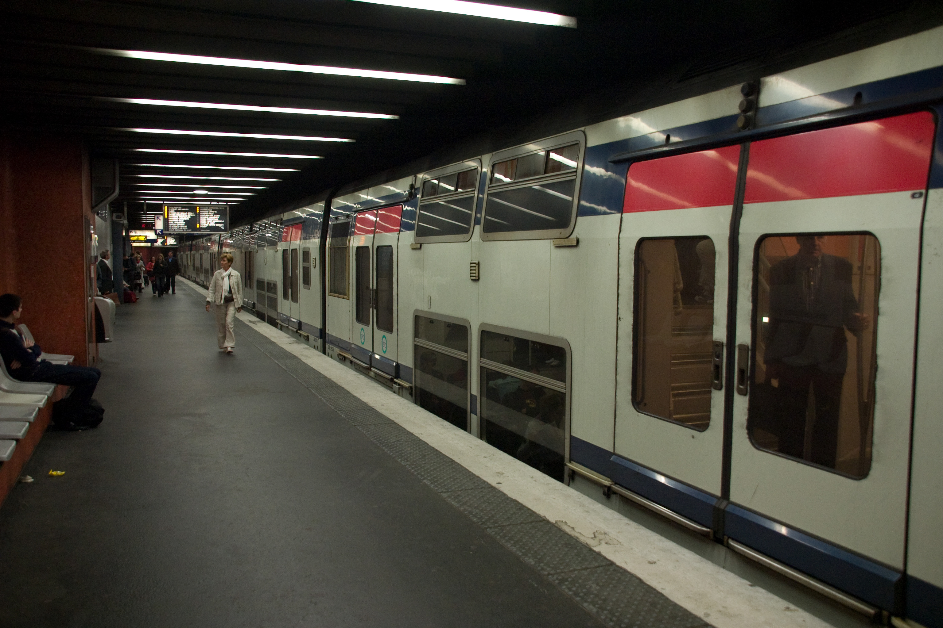 Gare de Lyon, Paris, France